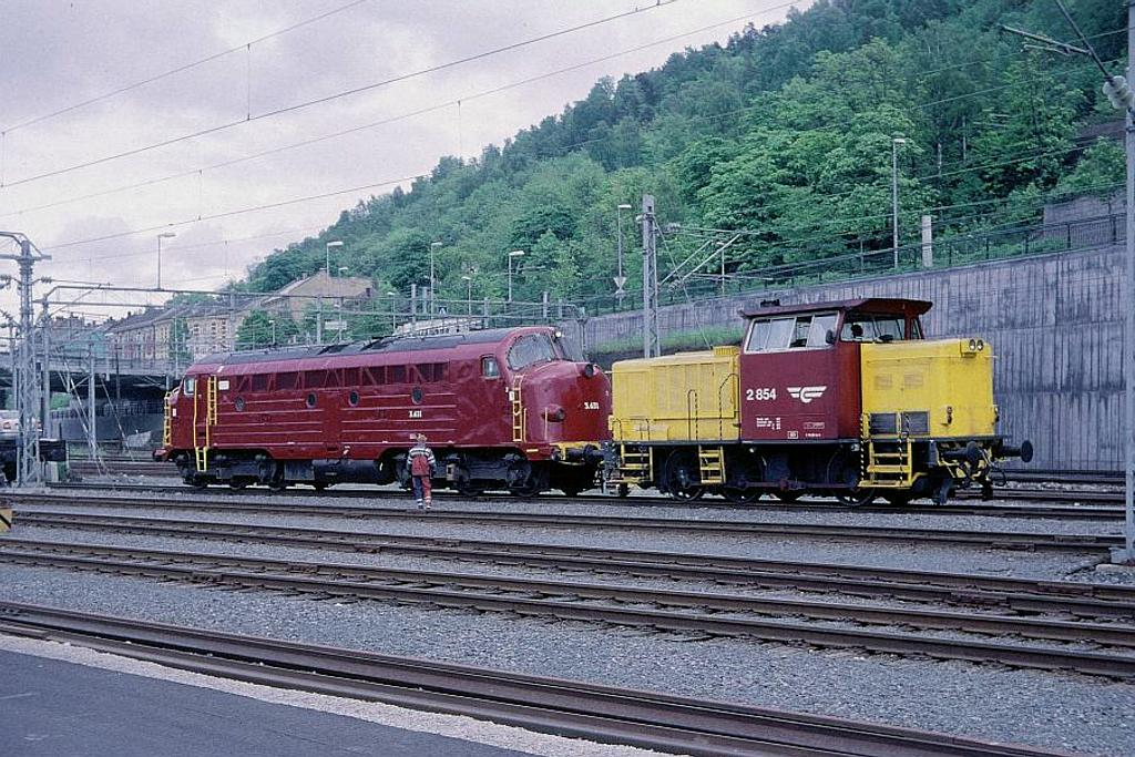 Di 3.631 og Skd 225 på Loenga